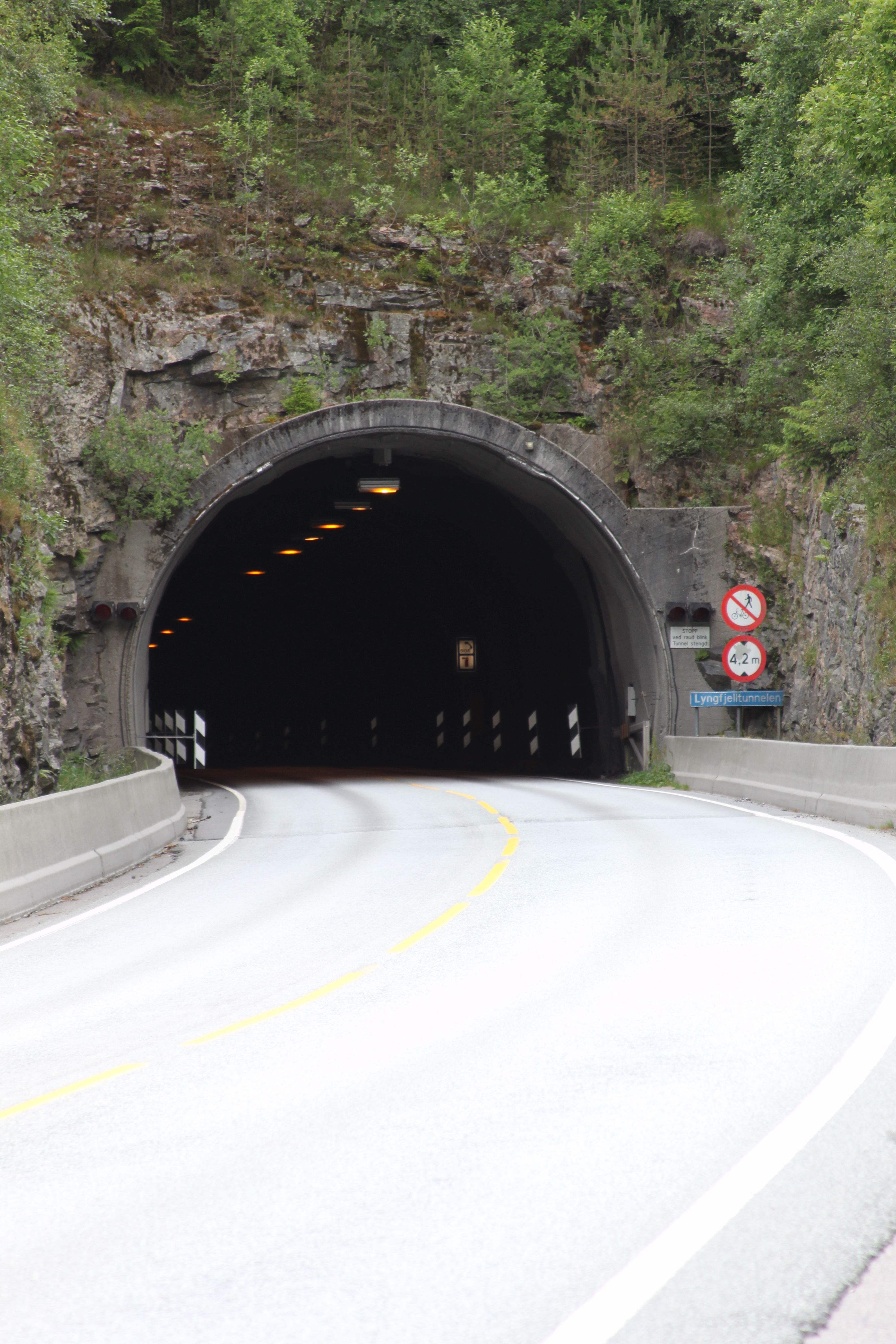 Lyngfjelltunnelen på fylkesvei 57 i Lindås kommune